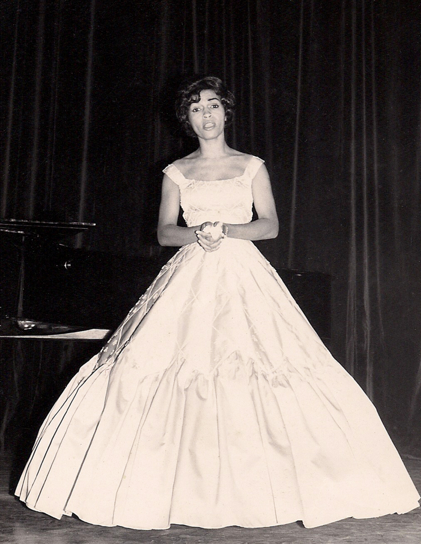 Primer recital en Caracas